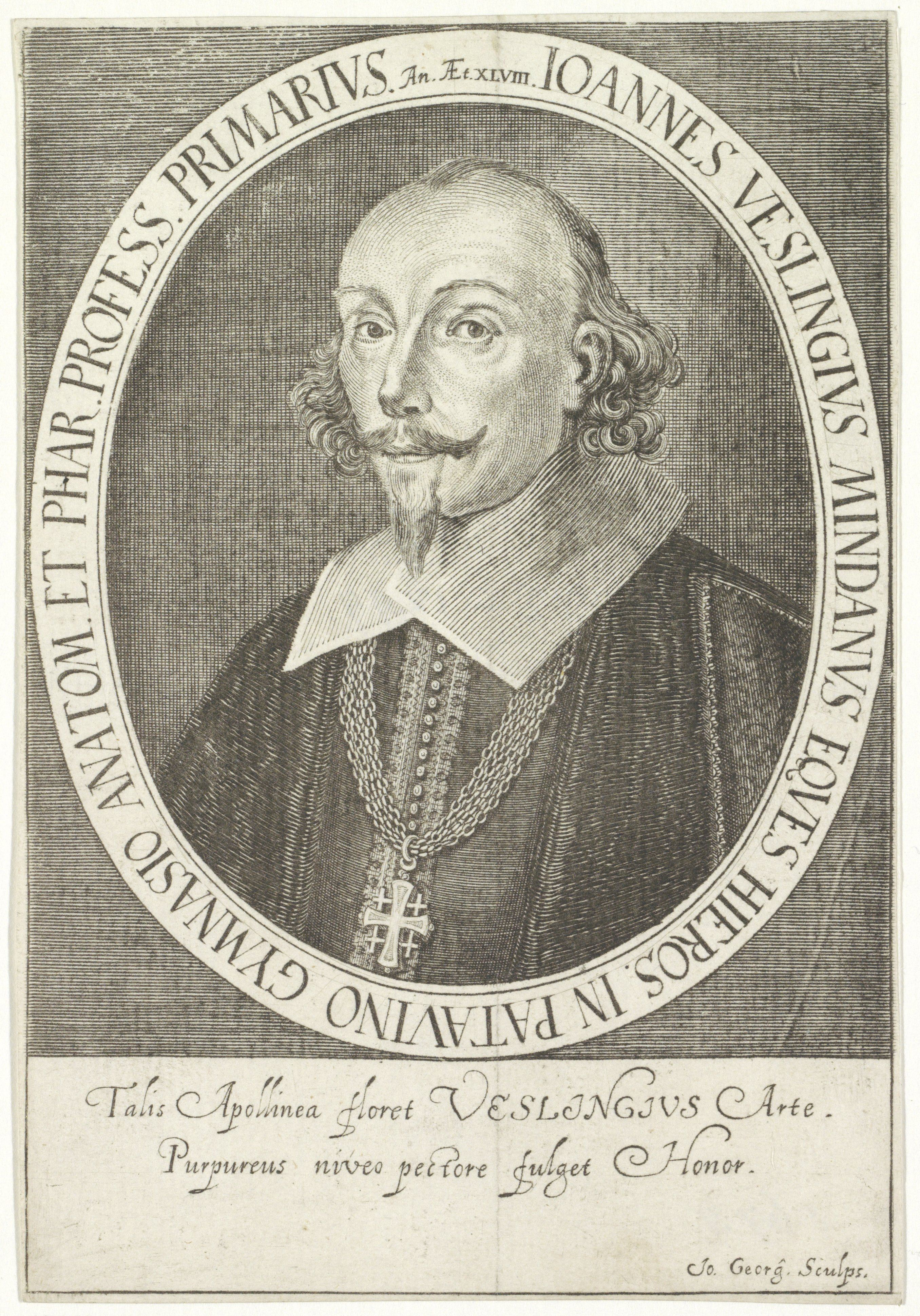 IdentificatieTitel(s): Portret van Johannes WeslingObjecttype: prent Objectnummer: RP-P-1912-1299Opschriften / Merken: verzamelaarsmerk, verso, gestempeld: Lugt 2228VervaardigingVervaardiger: prentmaker: Giovanni Georgi (vermeld op object)Plaats vervaardiging: ItaliëDatering: ca. 1600 - ca. 1699Fysieke kenmerken: gravureMateriaal: papier Techniek: graveren (drukprocedé)Afmetingen: blad: h 165 mm (Binnen plaatrand afgesneden.) × b 114 mm (Binnen plaatrand afgesneden.)OnderwerpWat: historical personsphysician, doctorWie: Johannes WeslingVerwerving en rechtenVerwerving: aankoop 1905Copyright: Publiek domein